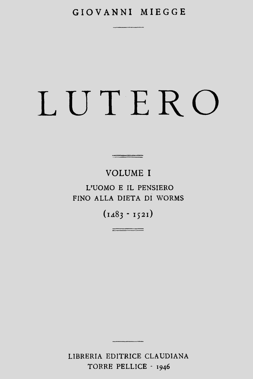 Prima edizione del 1946 de Lutero. L'uomo e il pensiero fino alla Dieta di Worms, Torino, Claudiana, 1947